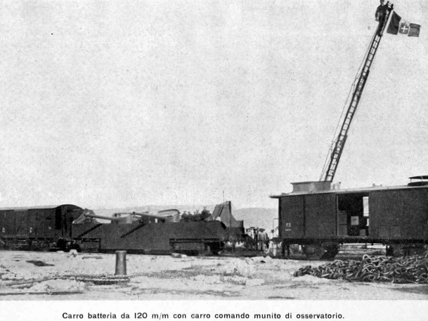 Carro batteria da 120 mm